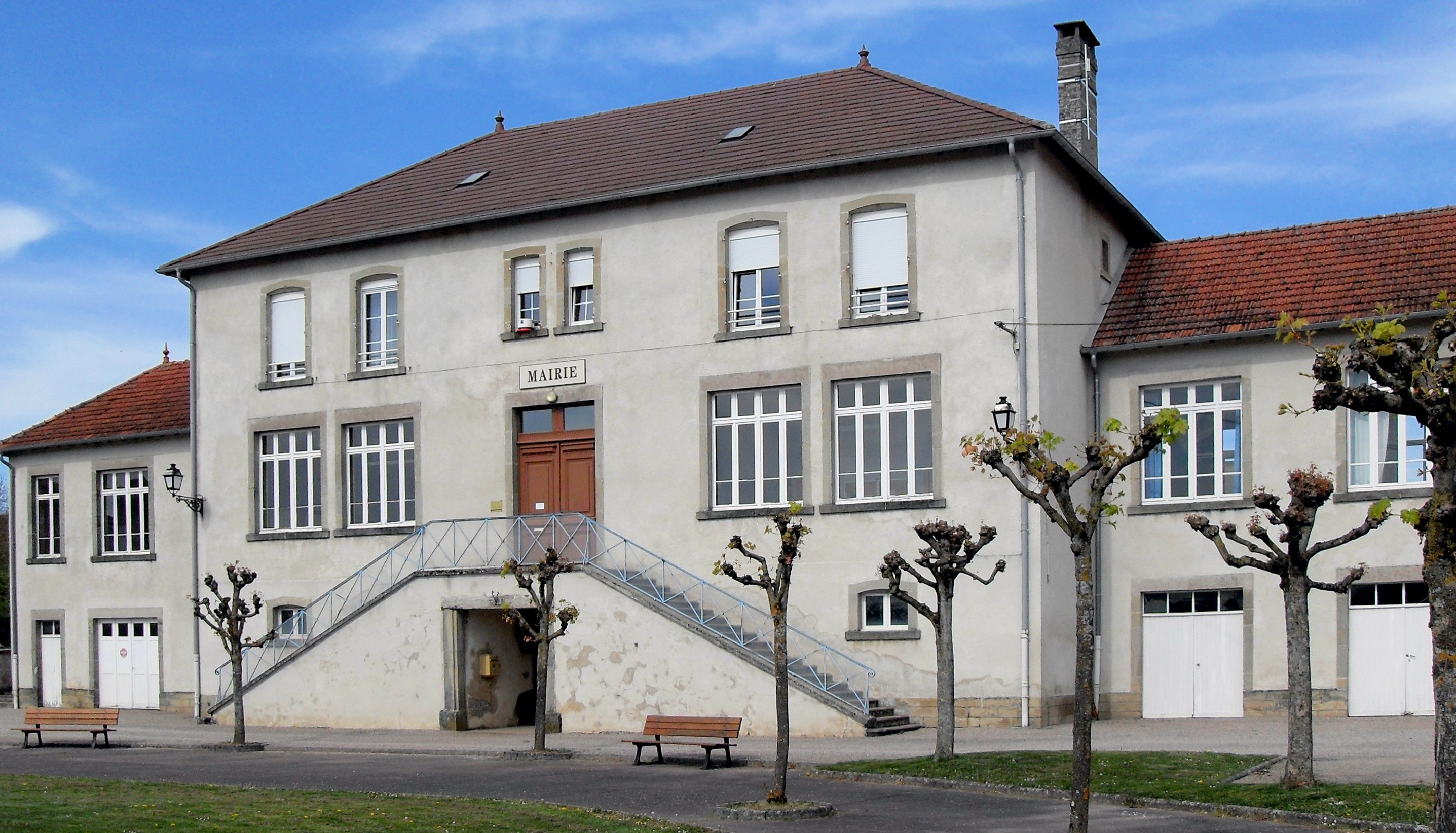 La mairie de Senaide